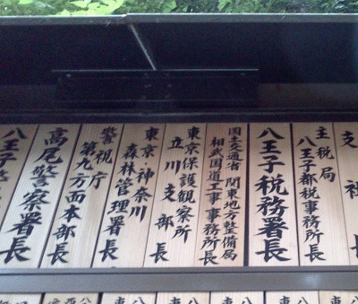 平成27年2月3日高尾山薬王院追儺式公務員参加者